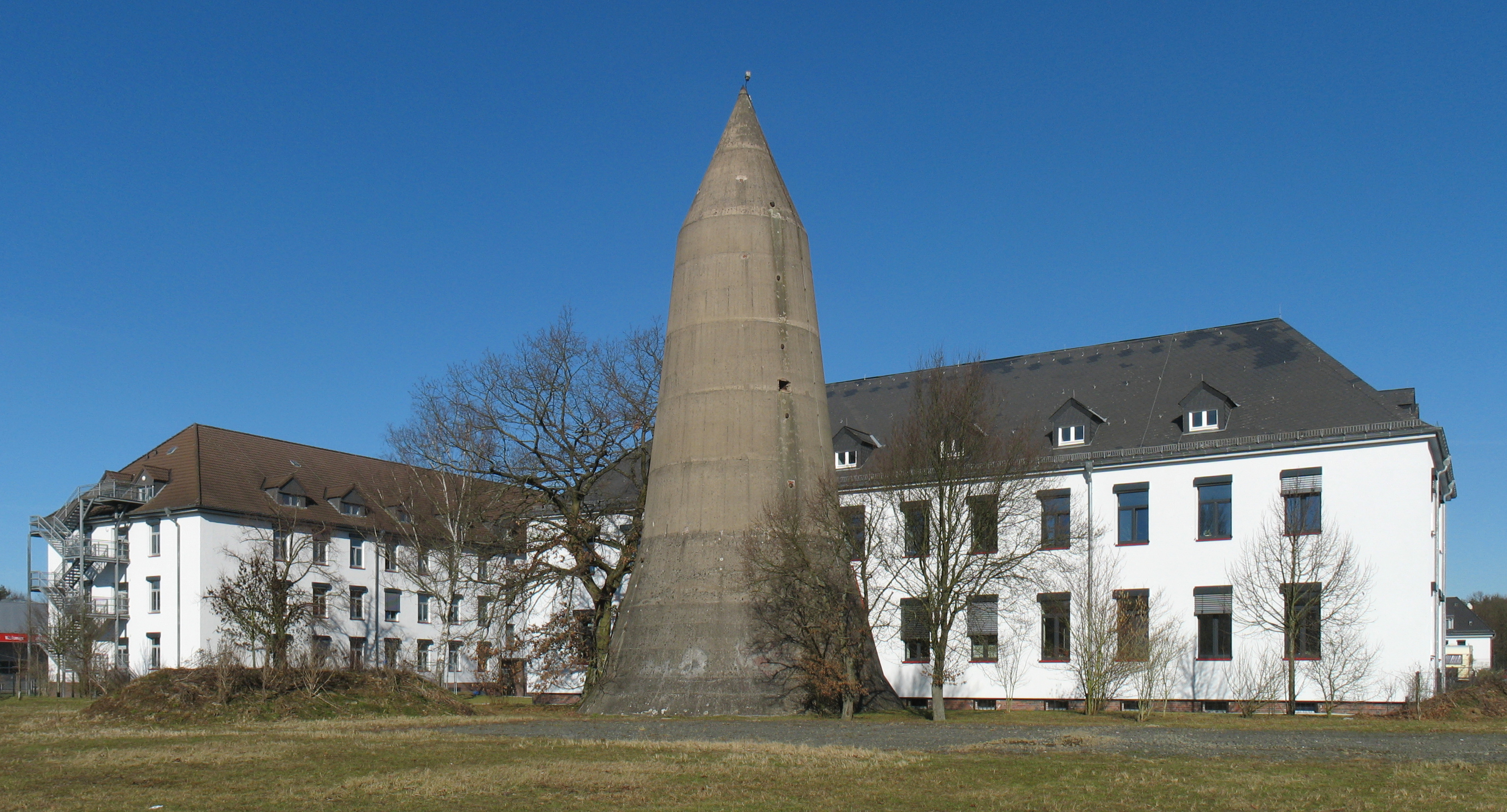 Hochbunker, Luftschutzturm der Bauart Winkel in Gießen, Rivers Automeile. Panorama mit Hugin generiert. Kleines Stück Gras unten rechts geklont.